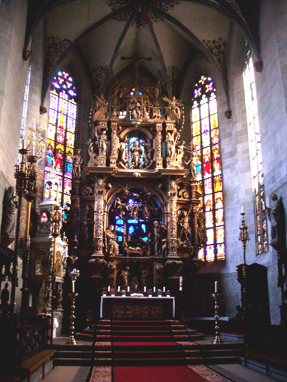 Überlingen, Germany: Überlinger Münster, Hochaltar